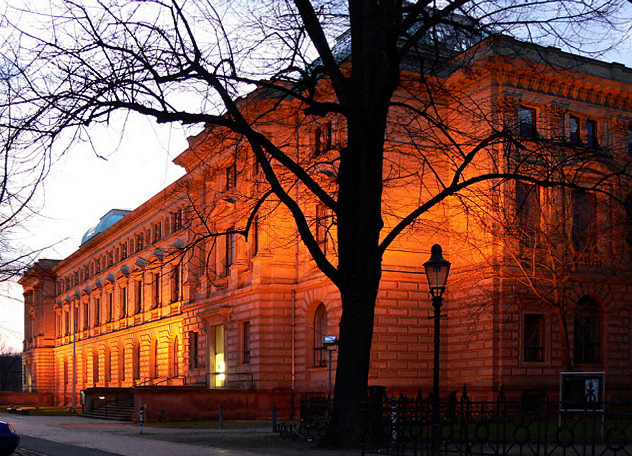 Herzog Anton Urlich-Museum at dusk